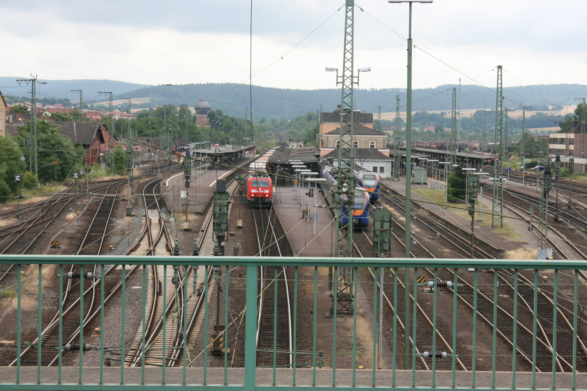 Blick von Norden auf den Bahnhof Bebra